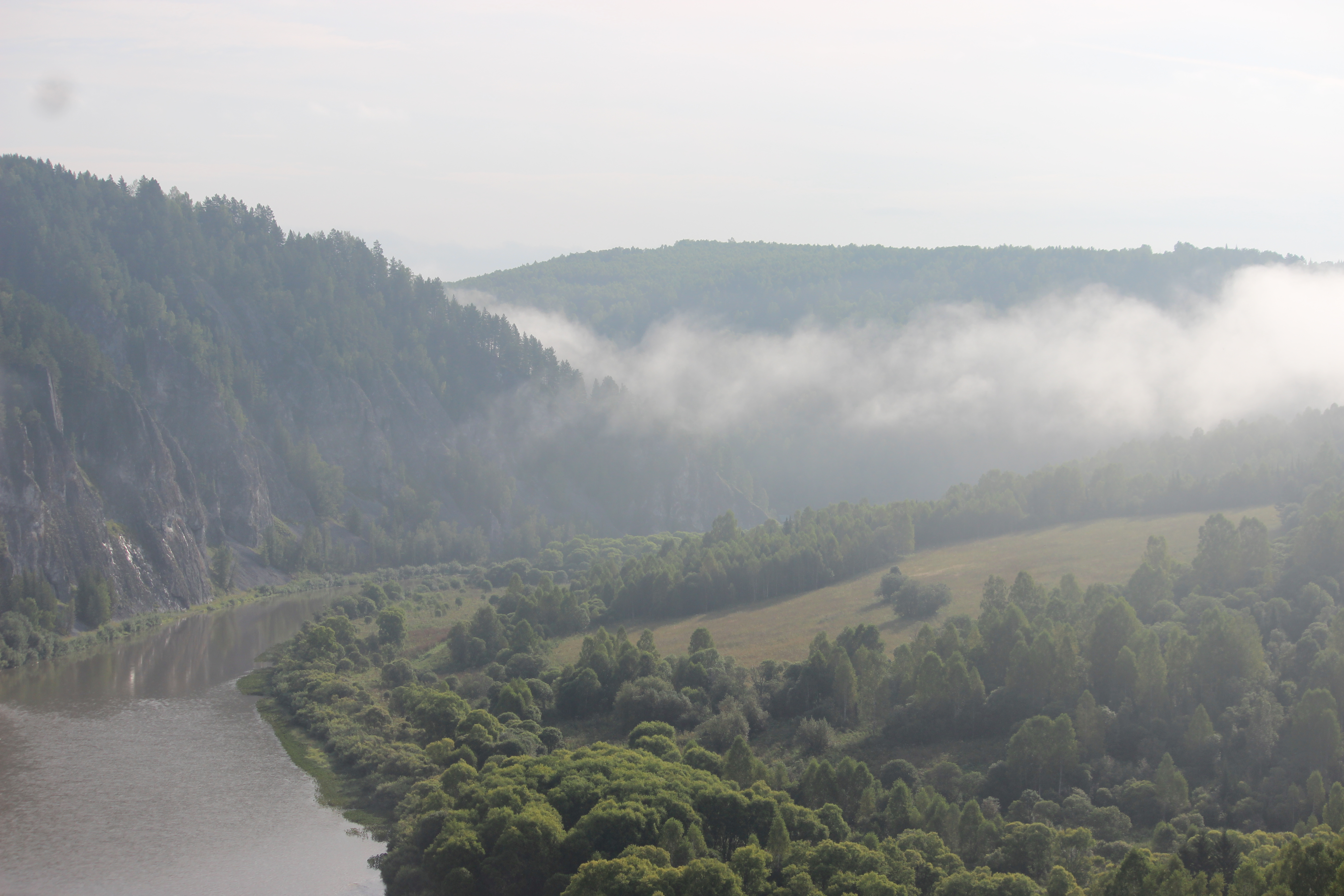 Шорский, Таштагольский район This image is related to the protected area of Russia number 4200024